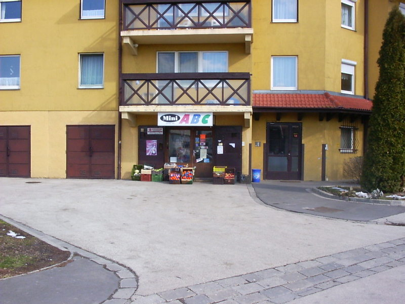 Kis alapterületű mini ABC külső portálja, úgynevezett garázsbolt